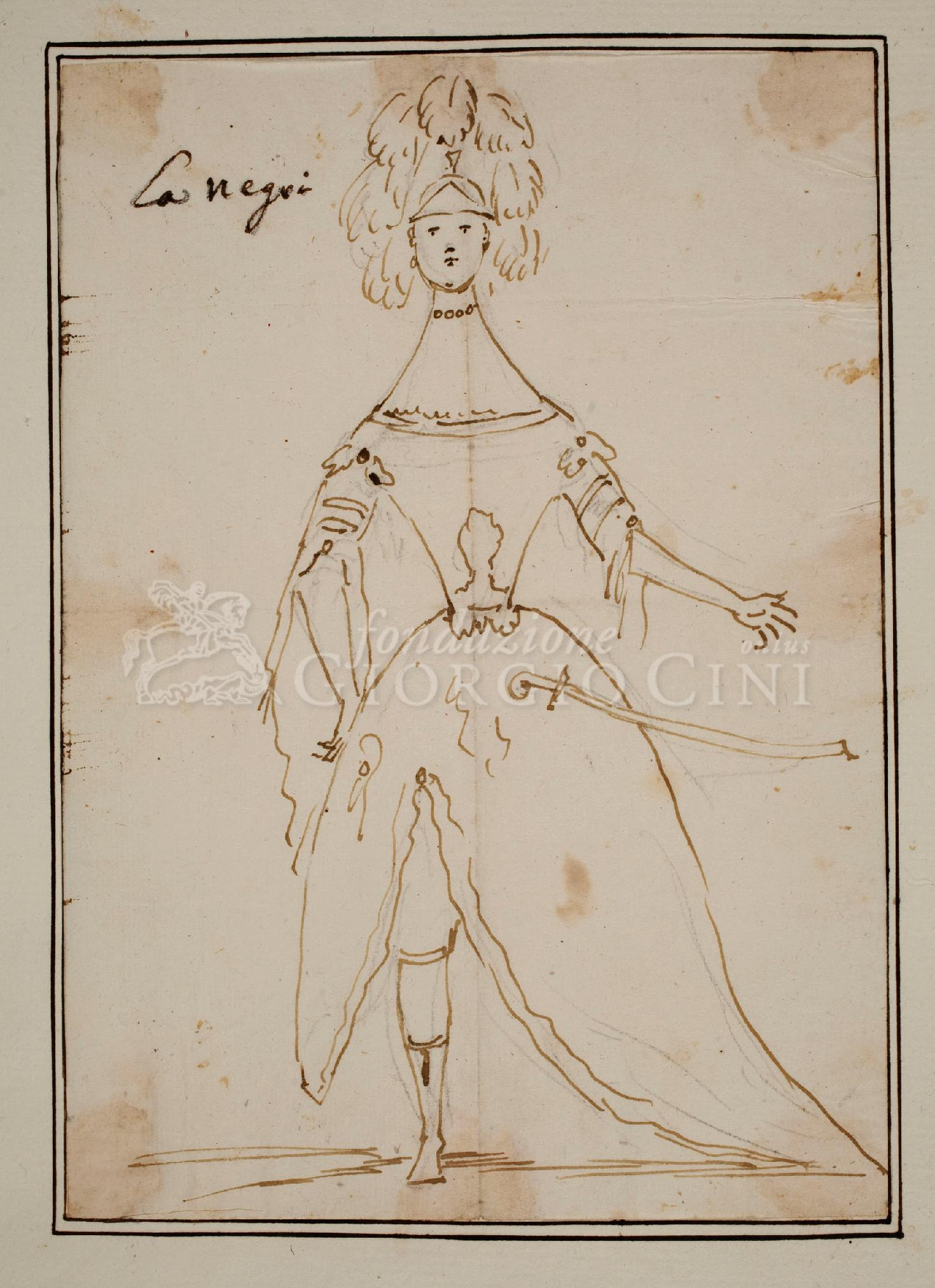 Caricatura di cantante, indicata dall'autore come "La Negri", in abiti di guerriero. Identificata inizialmente con il soprano Antonia Negri Tomii in occasione della mostra "Caricature di Anton Maria Zanetti" del 1969, secondo il Dizionario Biografico degli Italiani la caricatura rappresenterebbe invece, con tutta probabilità, il contralto Maria Caterina Negri, spesso impiegata (a differenza della Negri Tomii) in personaggi in abito maschile